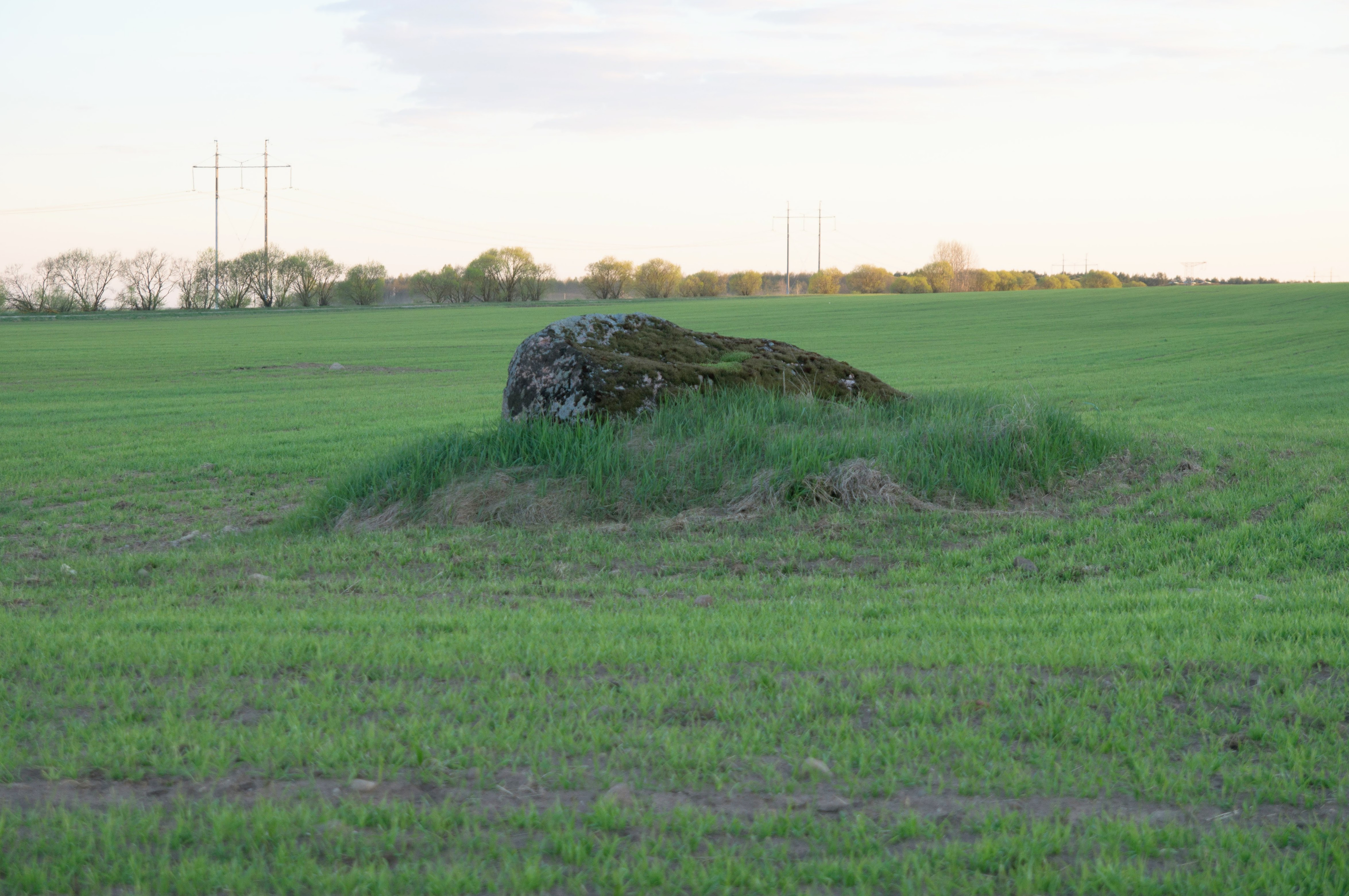 Помнік прыроды мясцовага значэння